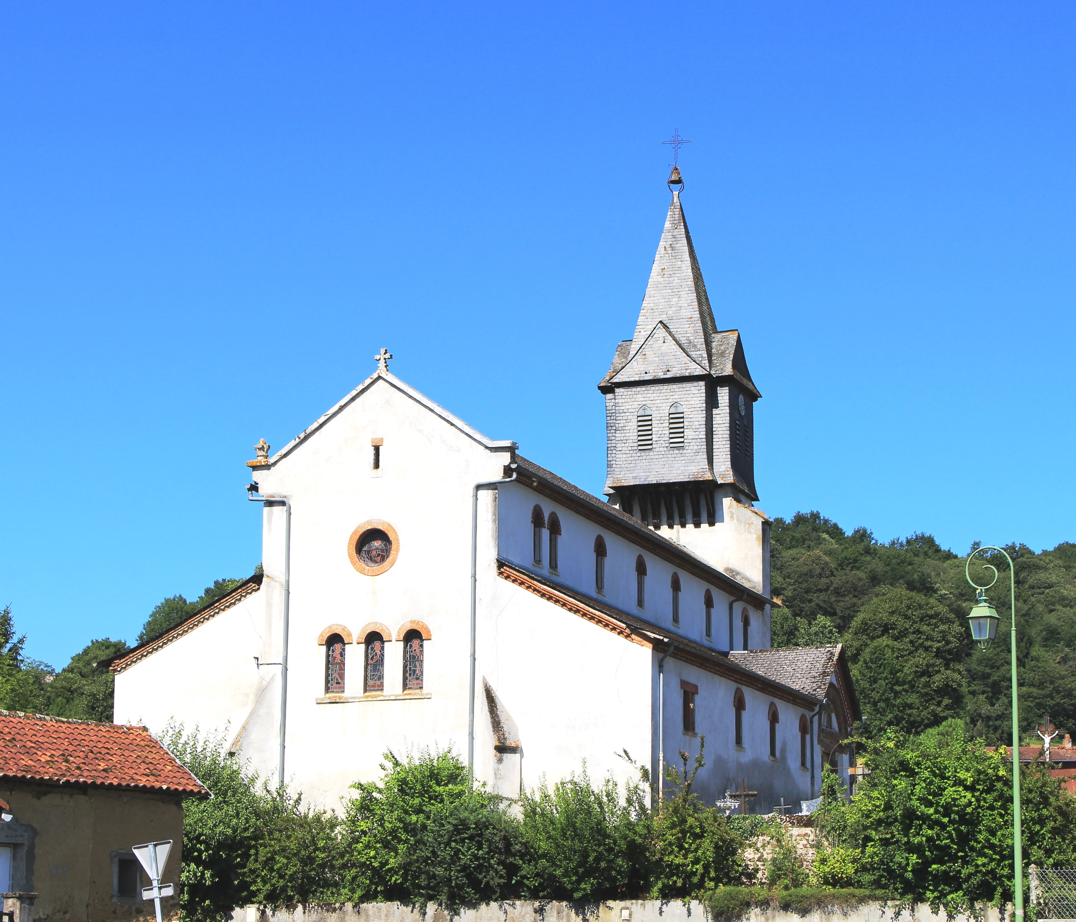 Église Saint-Laurent de Burg (Hautes-Pyrénées)